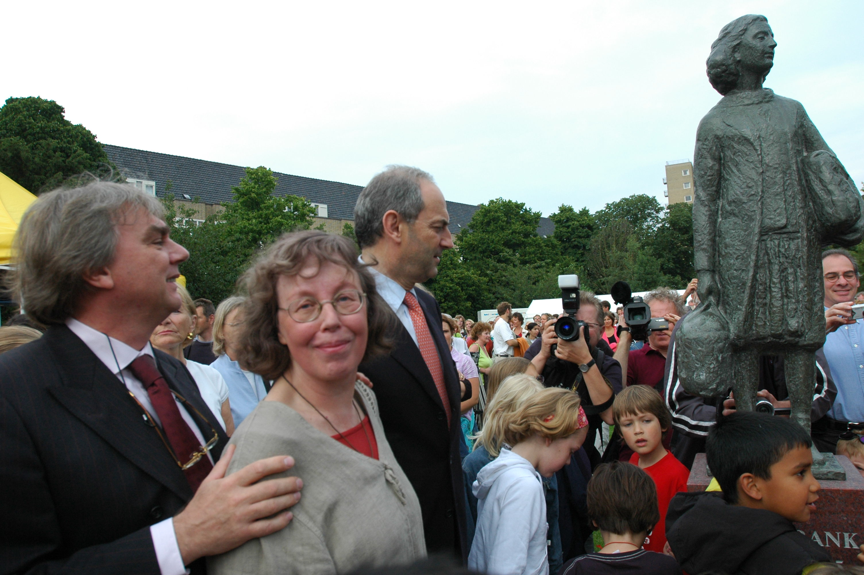 Jet Schepp, Job Cohen en Gert-Jan Jimmink (initiatiefnemer) Onthulling van het beeld op het Merwedeplein door de Burgemeester